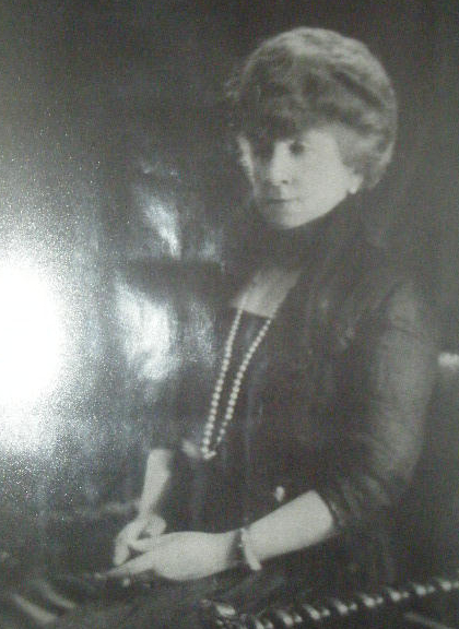 La señora Adelia María Harilaos de Olmos, marquesa pontificia